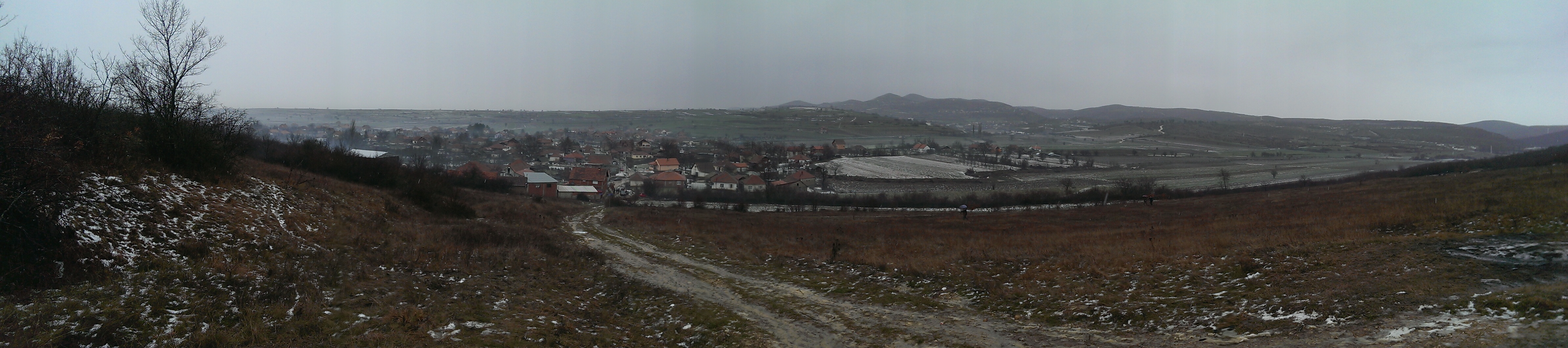 Горња Гуштерица Панорама